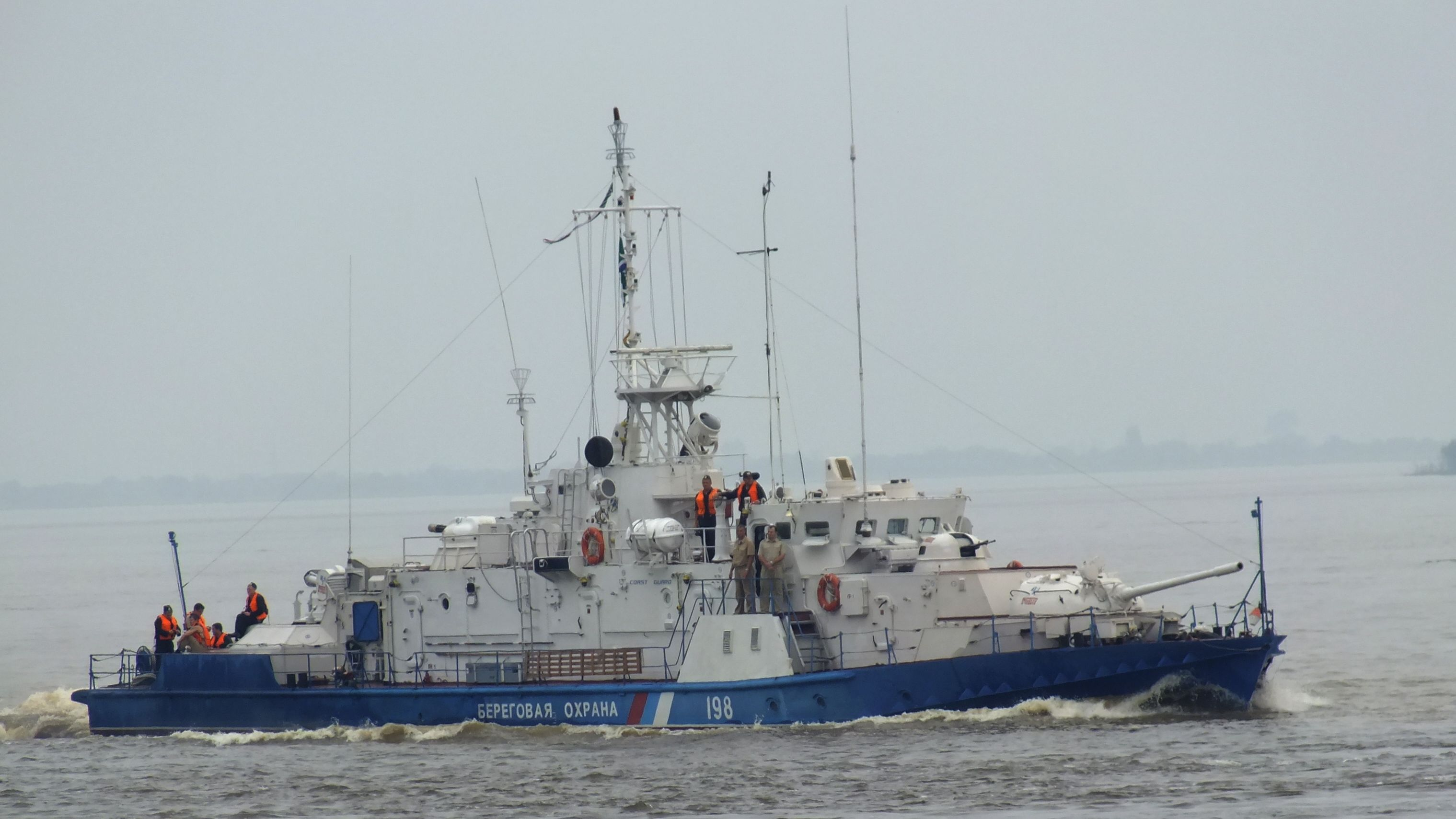 Vasiliy Poyarkov (ship, 1991)